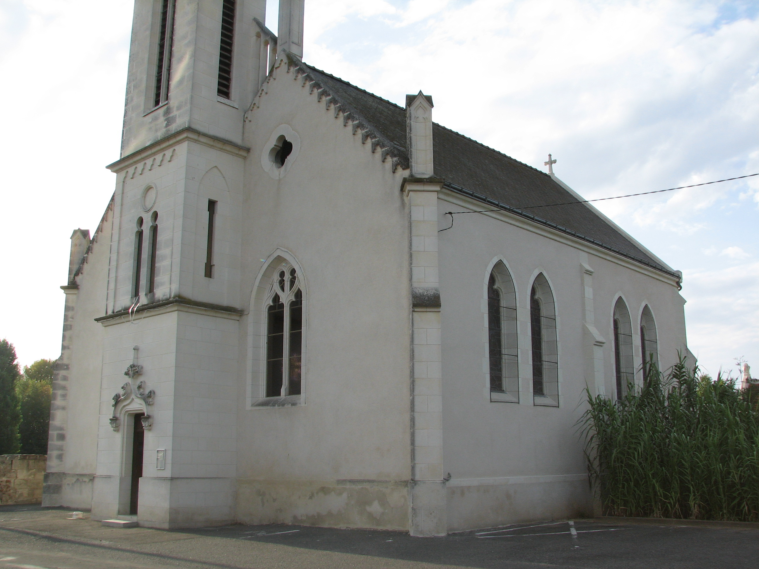 église de berthenay